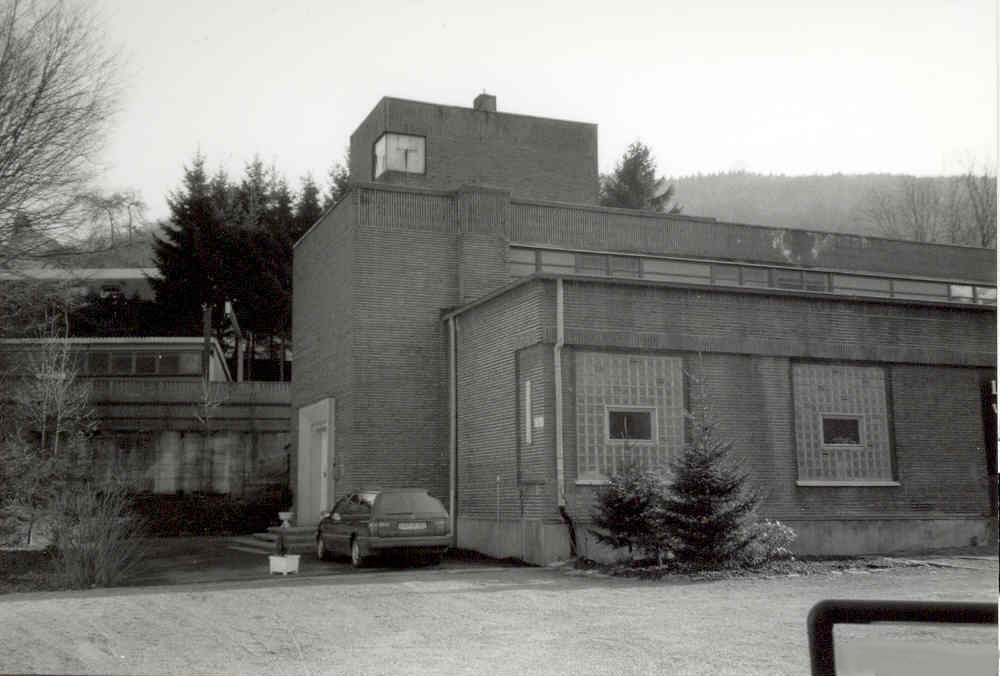 Haspe: Das ehemalige Unterwerk am Schützenhof der Kleinbahn Haspe–Voerde–Breckerfeld